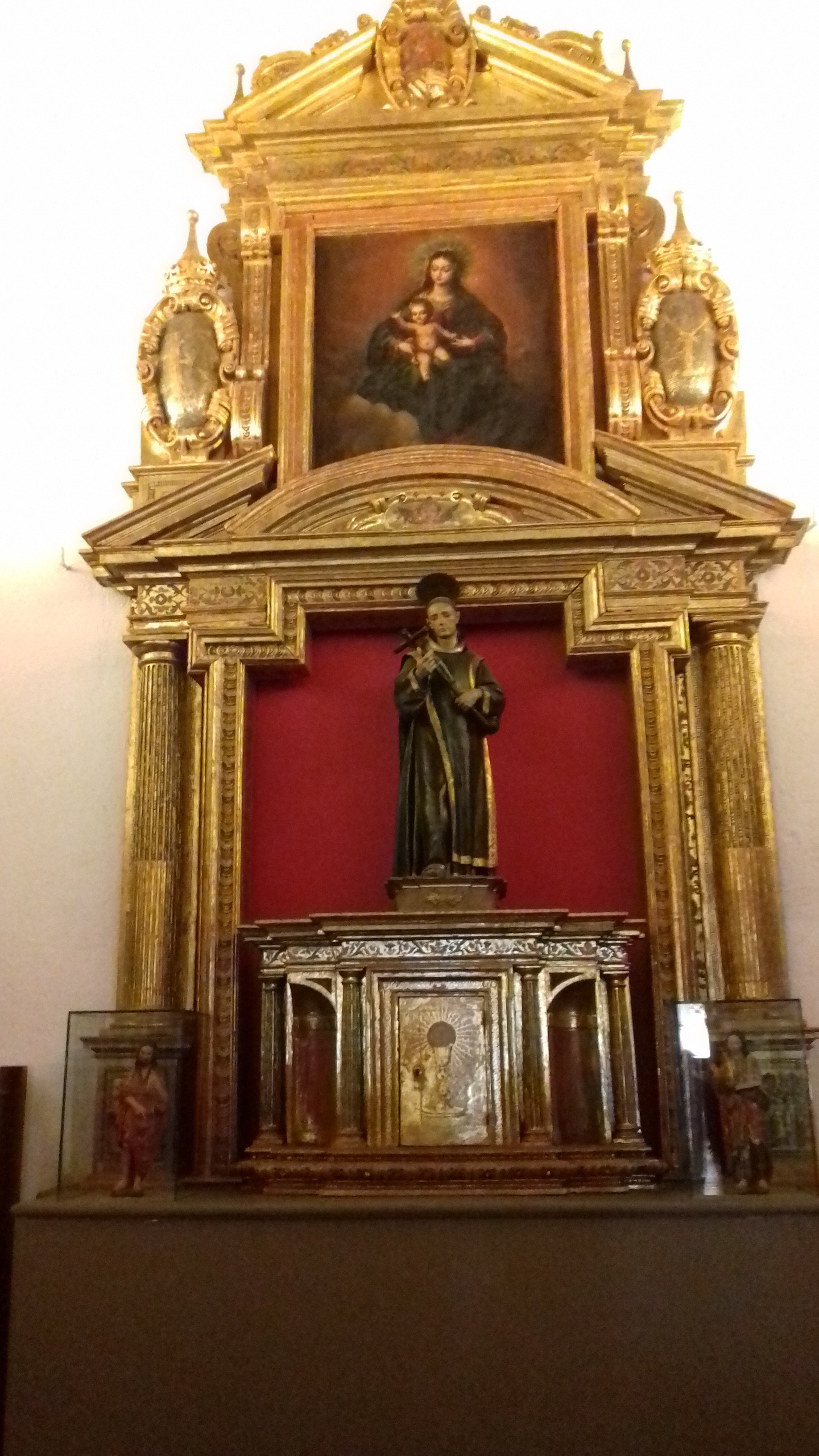 Retablo que se encontraba en la primitiva capilla.